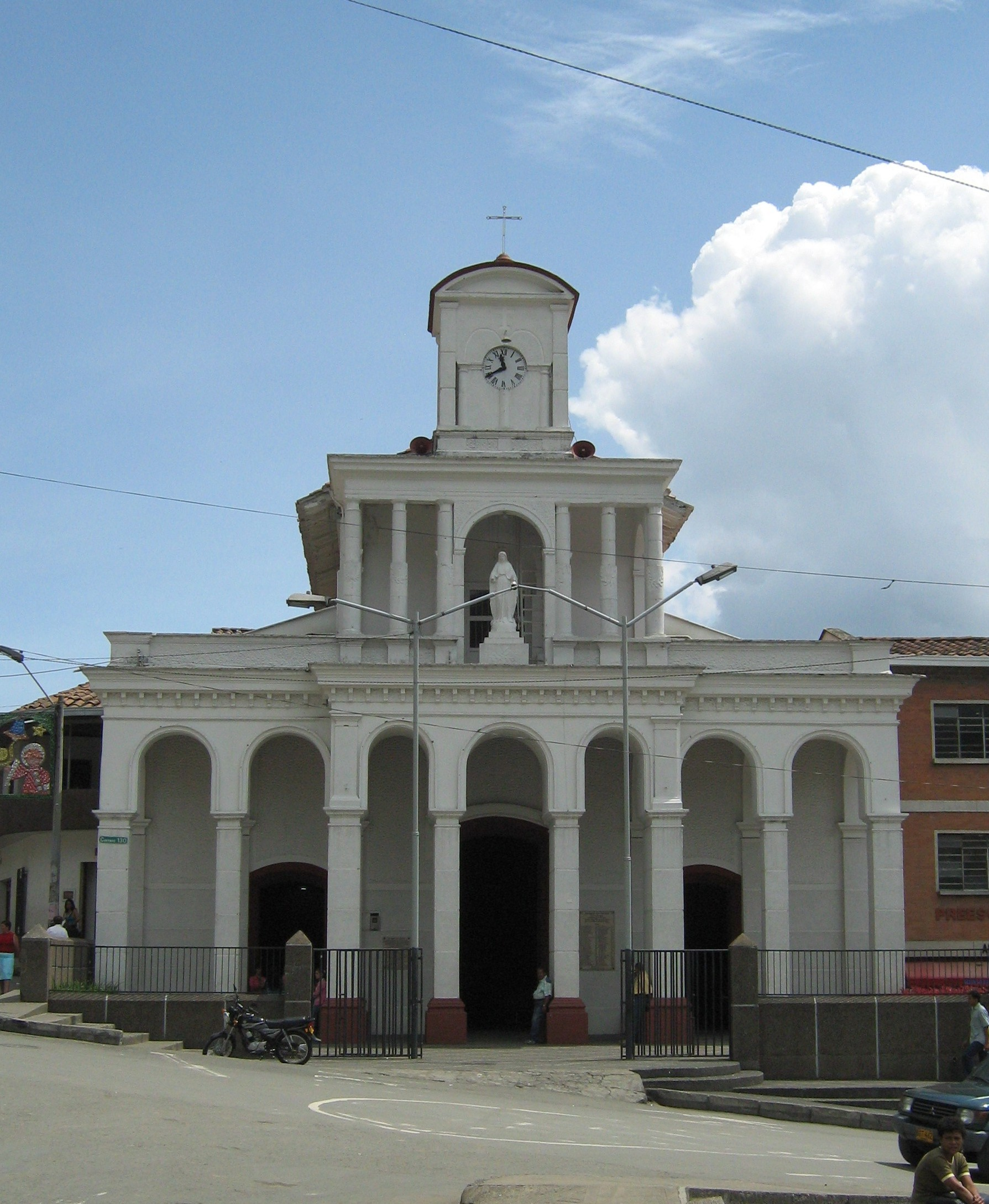 Iglesia de San Cristóbal en el corregimiento San Cristóbal, Medellín, Colombia.